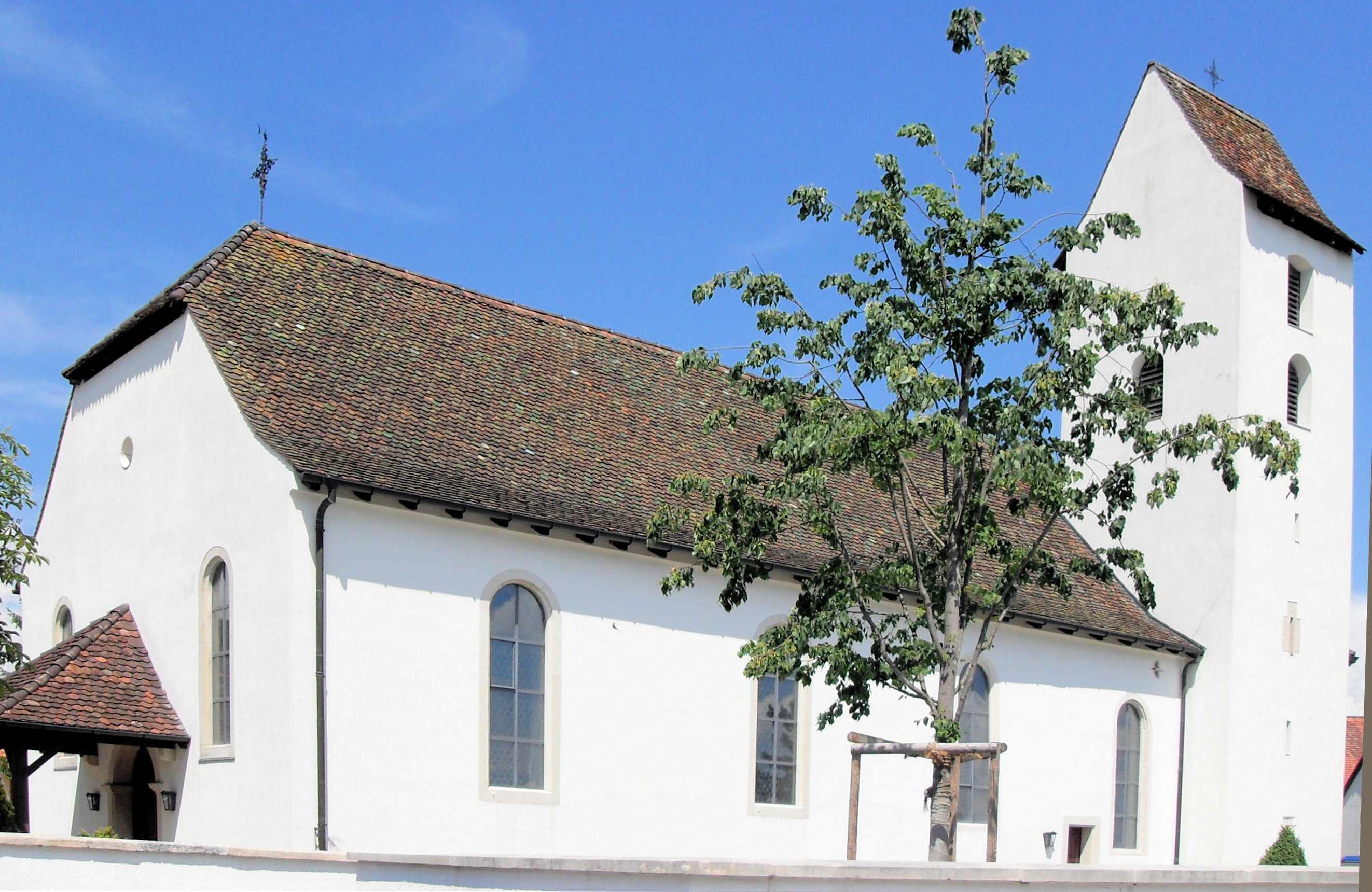 Pfarrkirche St. Pantaleon im gleichnamigen Teil der Gemeinde Nuglar-St. Pantaleon, Kanton Solothurn, Schweiz